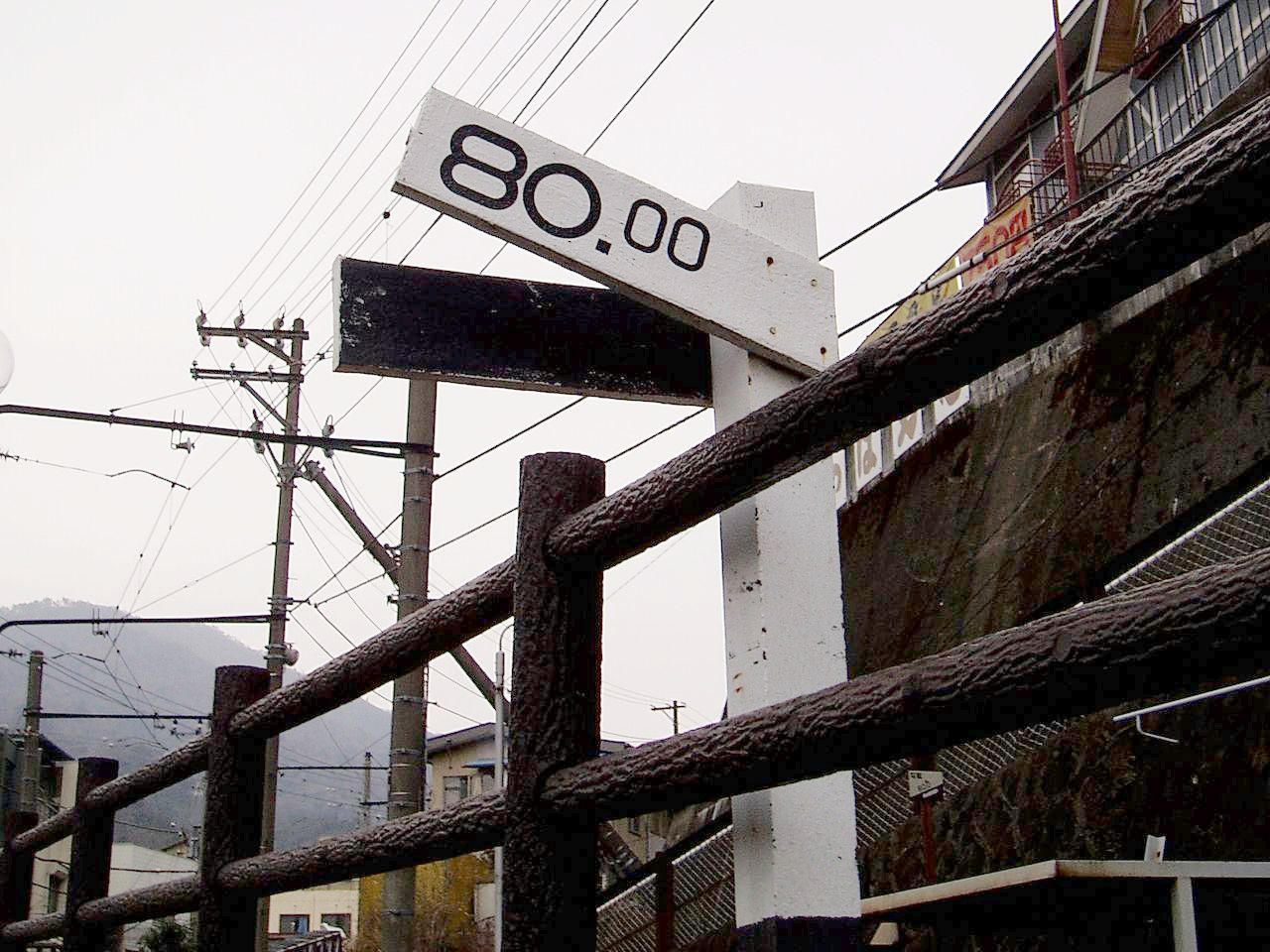 箱根登山鉄道の80‰の勾配標識。 箱根湯本駅～塔ノ沢駅間（箱根湯本駅前広場から撮影） 2007.02.19 投稿者が撮影